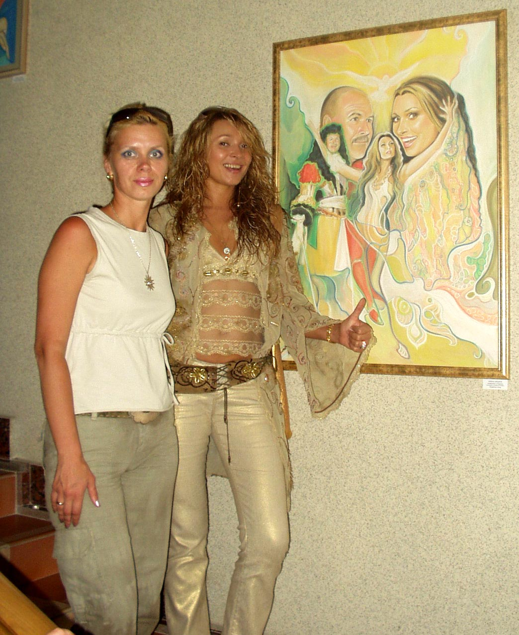 Елена Ильина и Анжелика Агурбаш, Славянский базар-2005 в Витебске